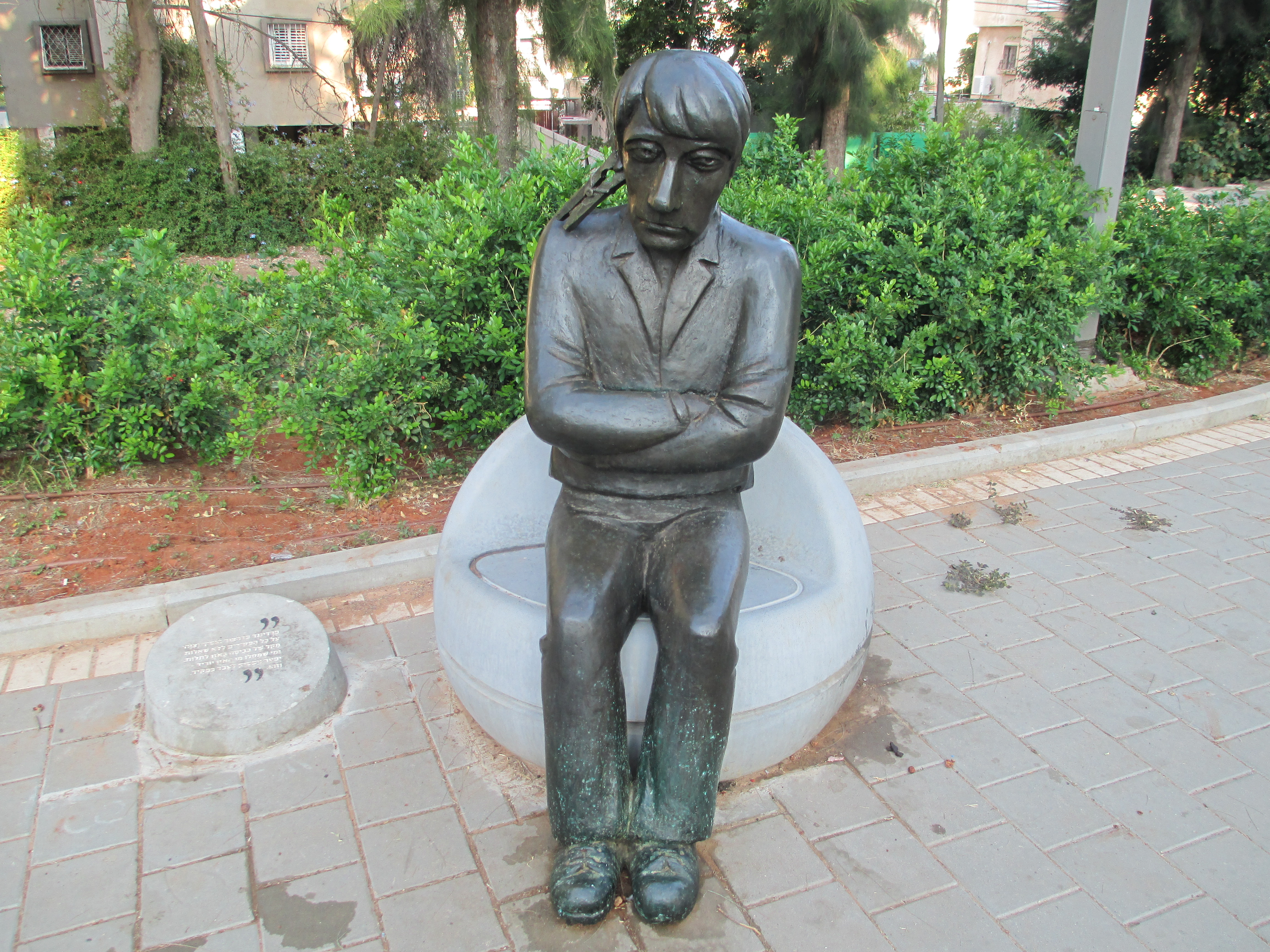 גן סיפור עלילות פרדיננד פדהצור בקיצור בחולון. המלך ציווה על פקידיו לתלות מקל כביסה באזנם.